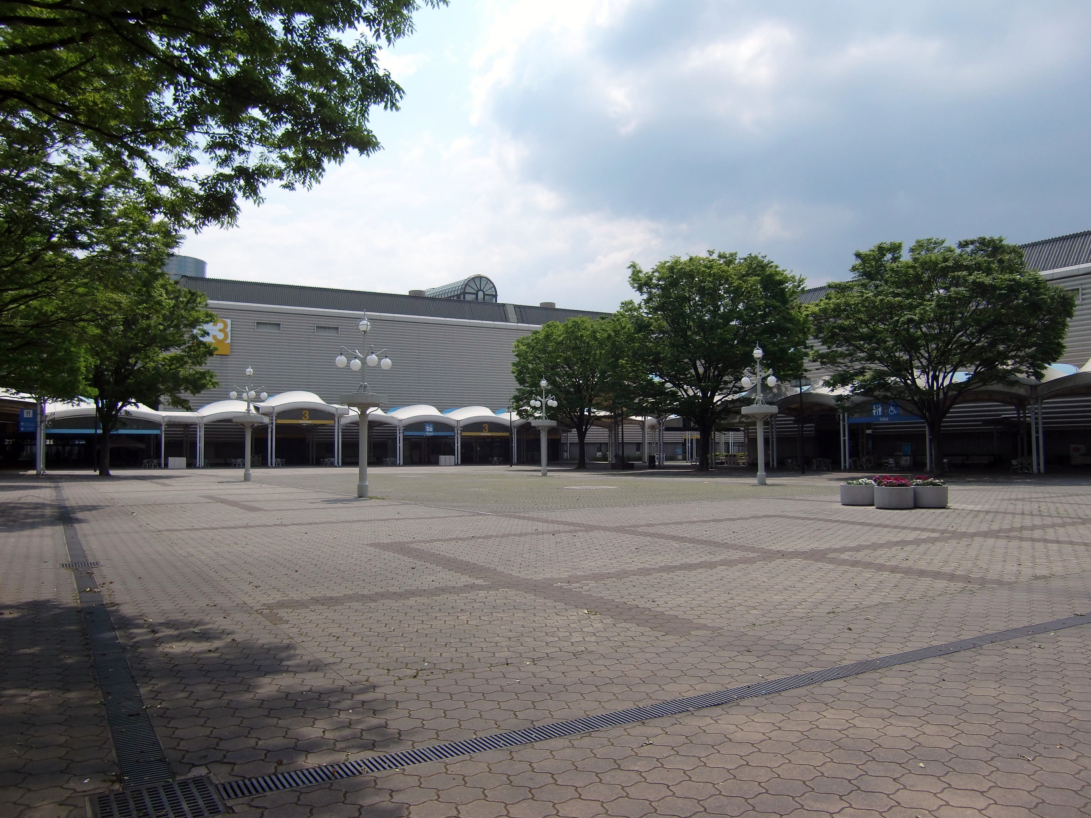 大阪国際見本市会場 スカイプラザ